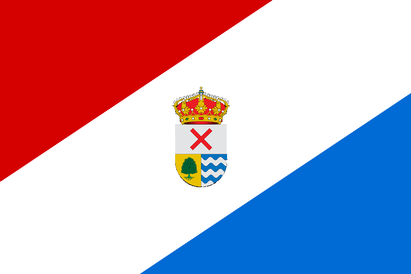 Bandera Municipal de Rascafría (Madrid)